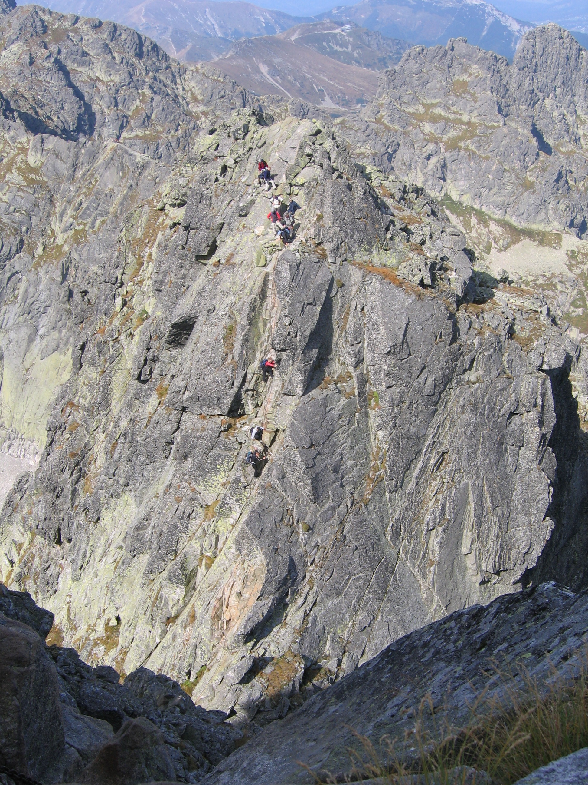 Fragment Orlej Perci. Zejście z Kozich Czub do Koziej Przełęczy Wyżniej